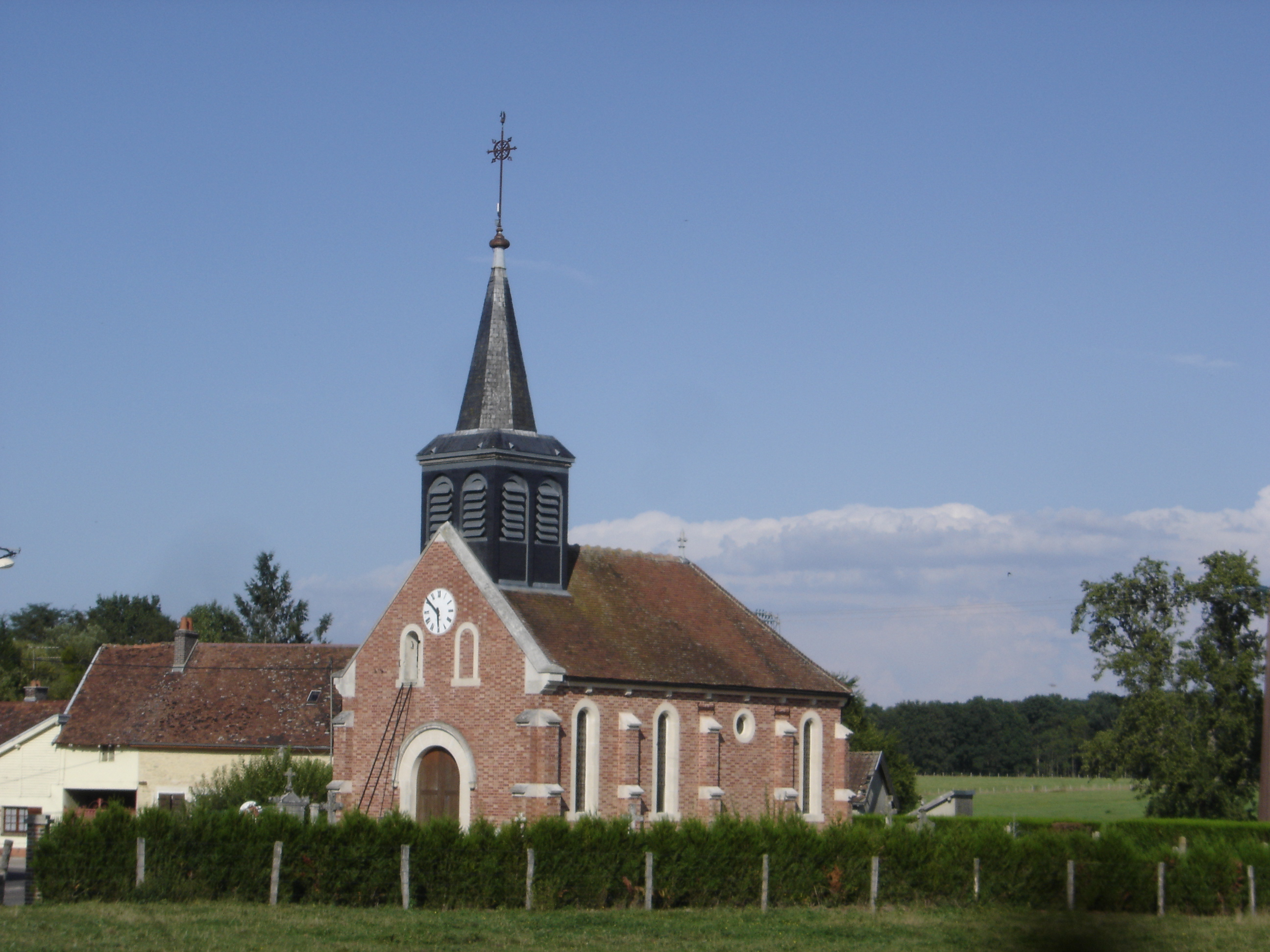 église Saint-Antoine de la Loge-aux-Chèvres - Aube - France